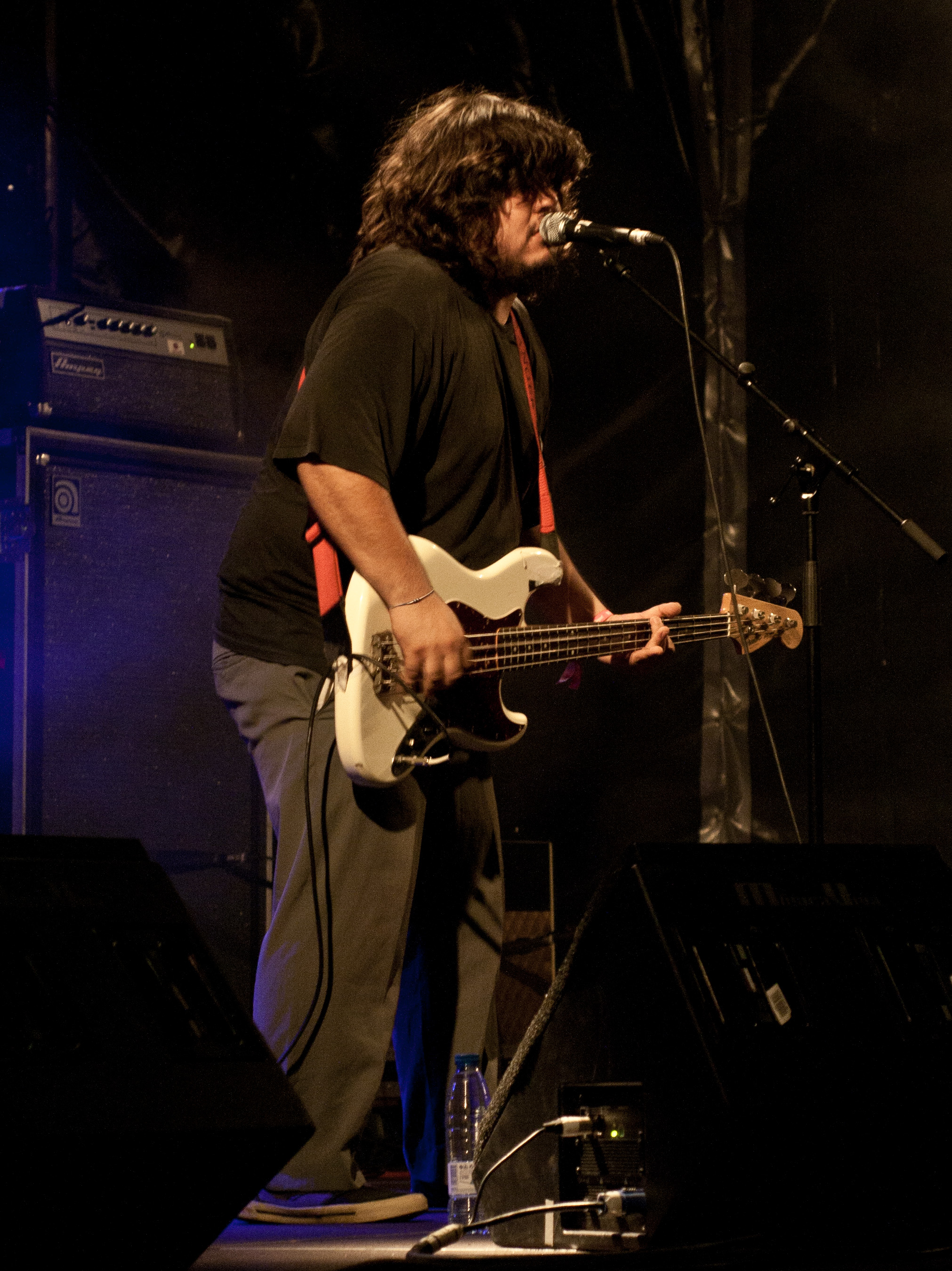 El Mató a un Policia Motorizado